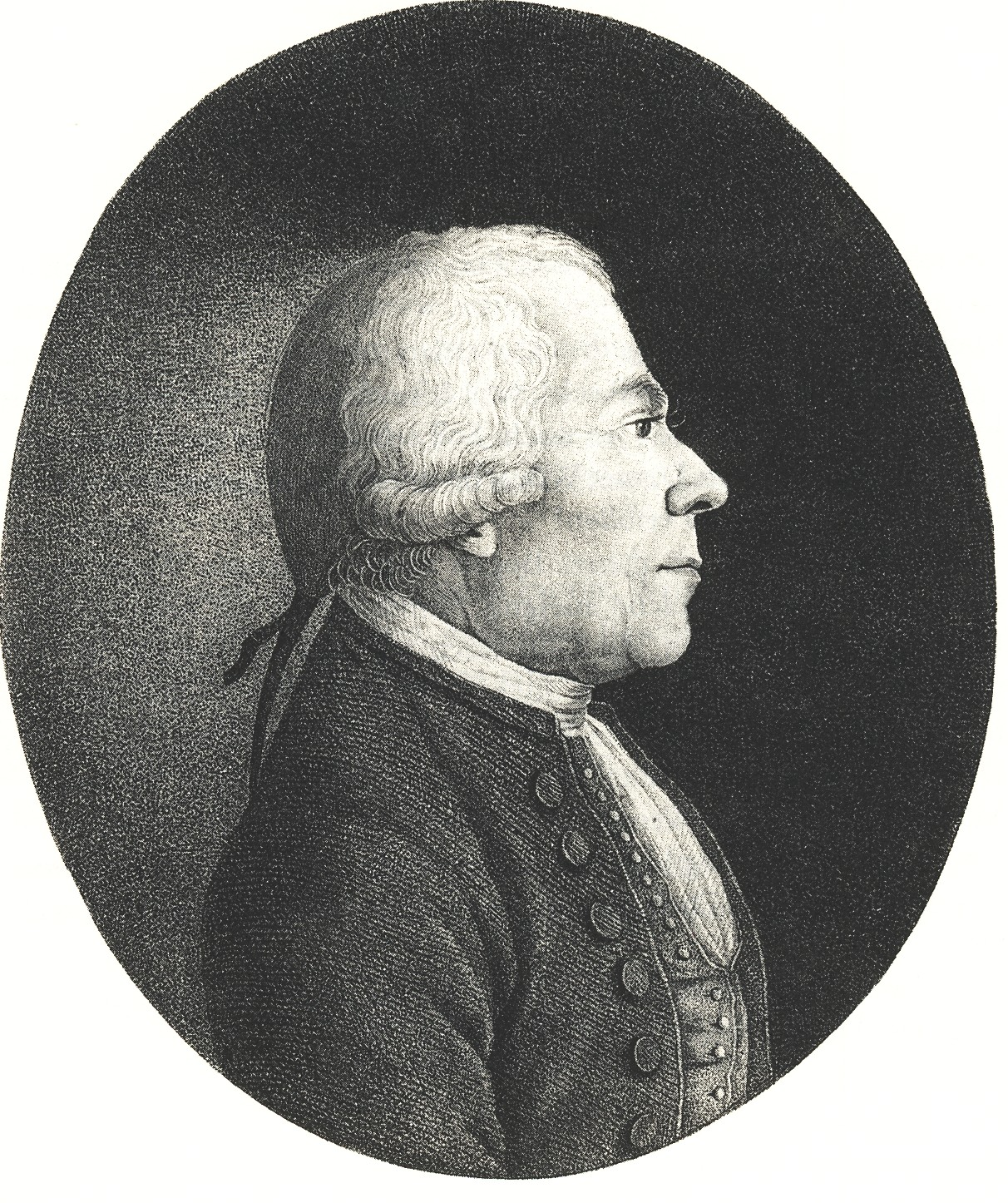 Mediziner und Hofrat Ernst Gottfried Baldinger (1738-1804), Ehemann der Schriftstellerin Dorothea Friderika Baldinger.